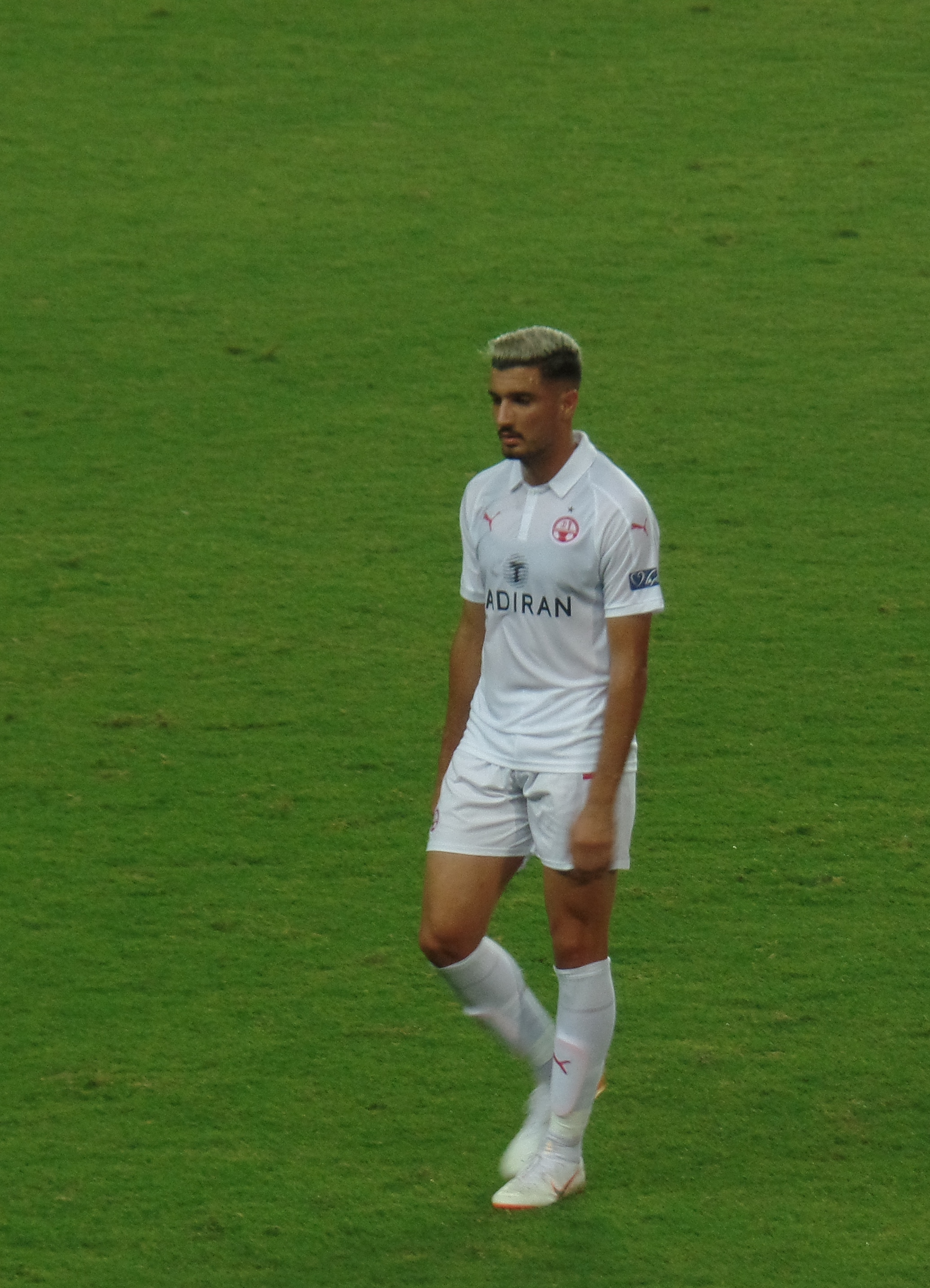 Niv Zrihan